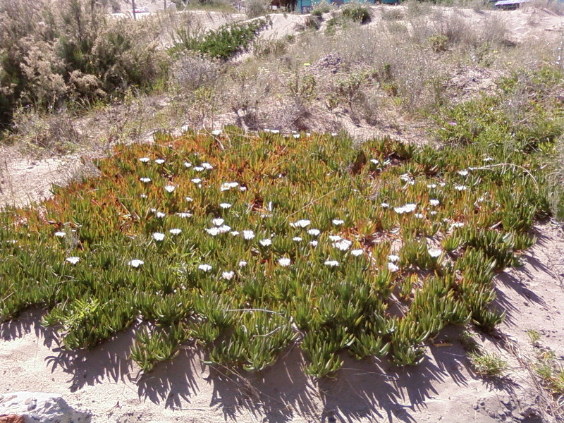 FIGUIERS DES HOTTENTOTS, Puerto Pirámides, péninsule de Valdès, début novembre 2011.